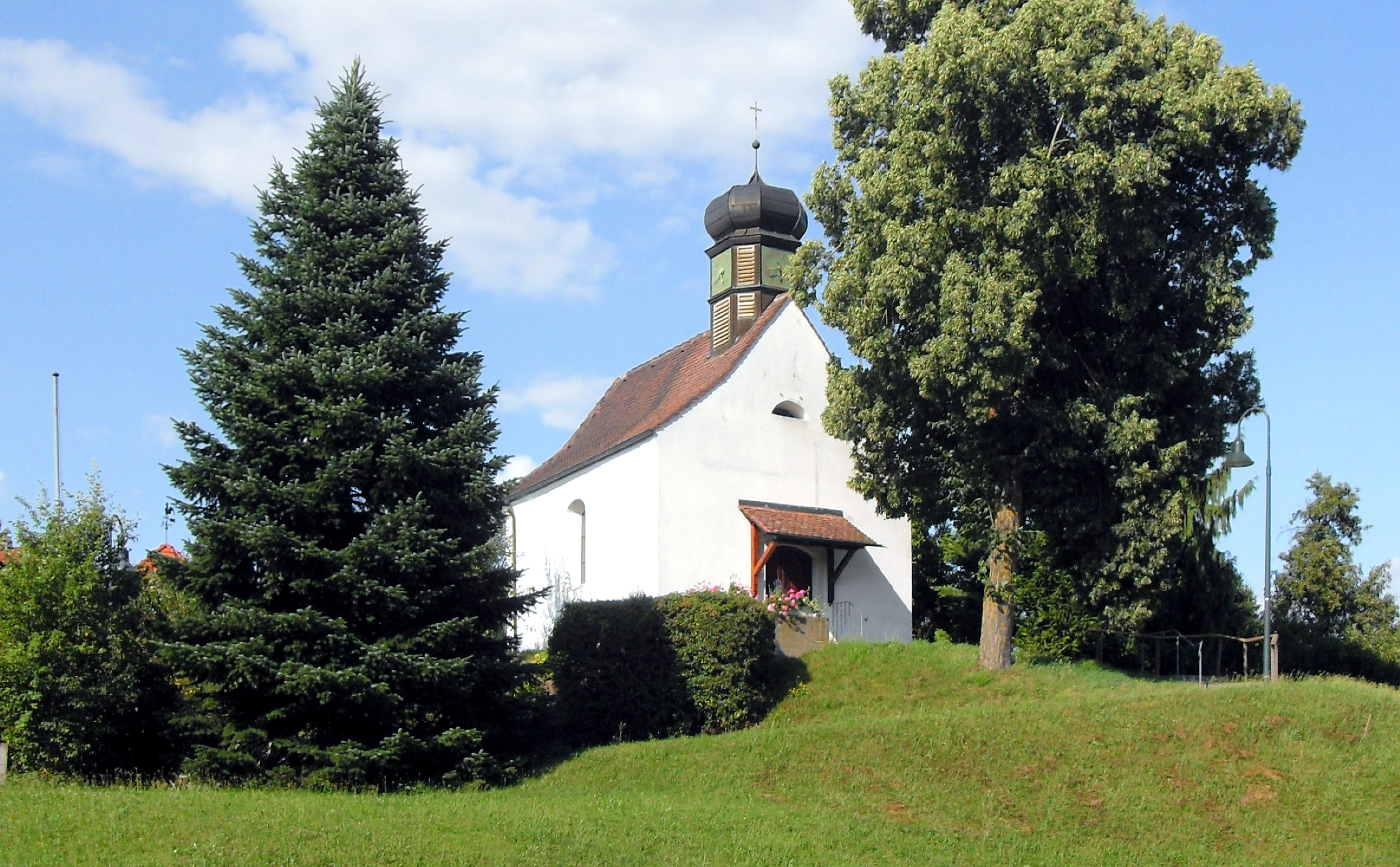 Kapelle St. Georg in Grasbeuren, Gemeinde Salem